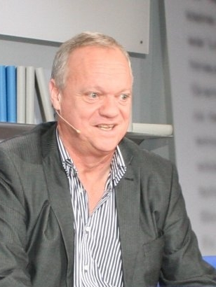 Fußballreporter Rolf Töpperwien mit seiner Autobiographie "Von Braunschweig bis Johannesburg" auf dem Blauen Sofa der Frankfurter Buchmesse